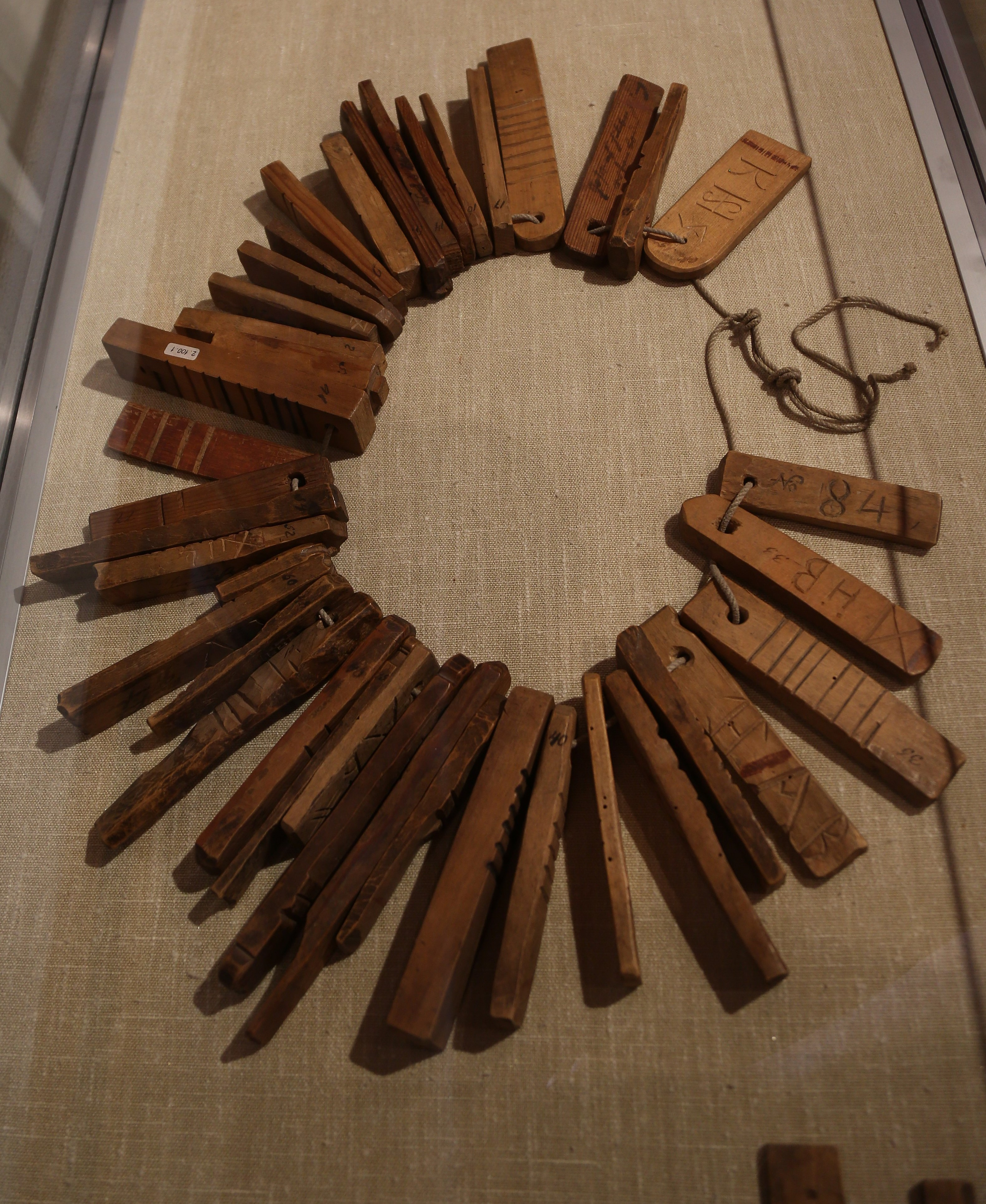 Beschriftung im Museum:Alprechtshölzer der Alpgenossenschaft Gross-StegAn Weide- und Holznutzungsertrag des Maiensässes besitzt jeder Genossenschafter eine gewisse Anzahl von Anteilen, ‹Weida› genannt. Im Jahr 1829 war das Gebiet der Genossenschaft Gross-Steg in 208 ¼ ‹Weida› eingeteilt. Die Anteilsrechte wurden in die Hölzer eingeschnitten. Mitte des 19. Jahrhunderts ersetzten die Weidebücher die hölzernen Dokumente.